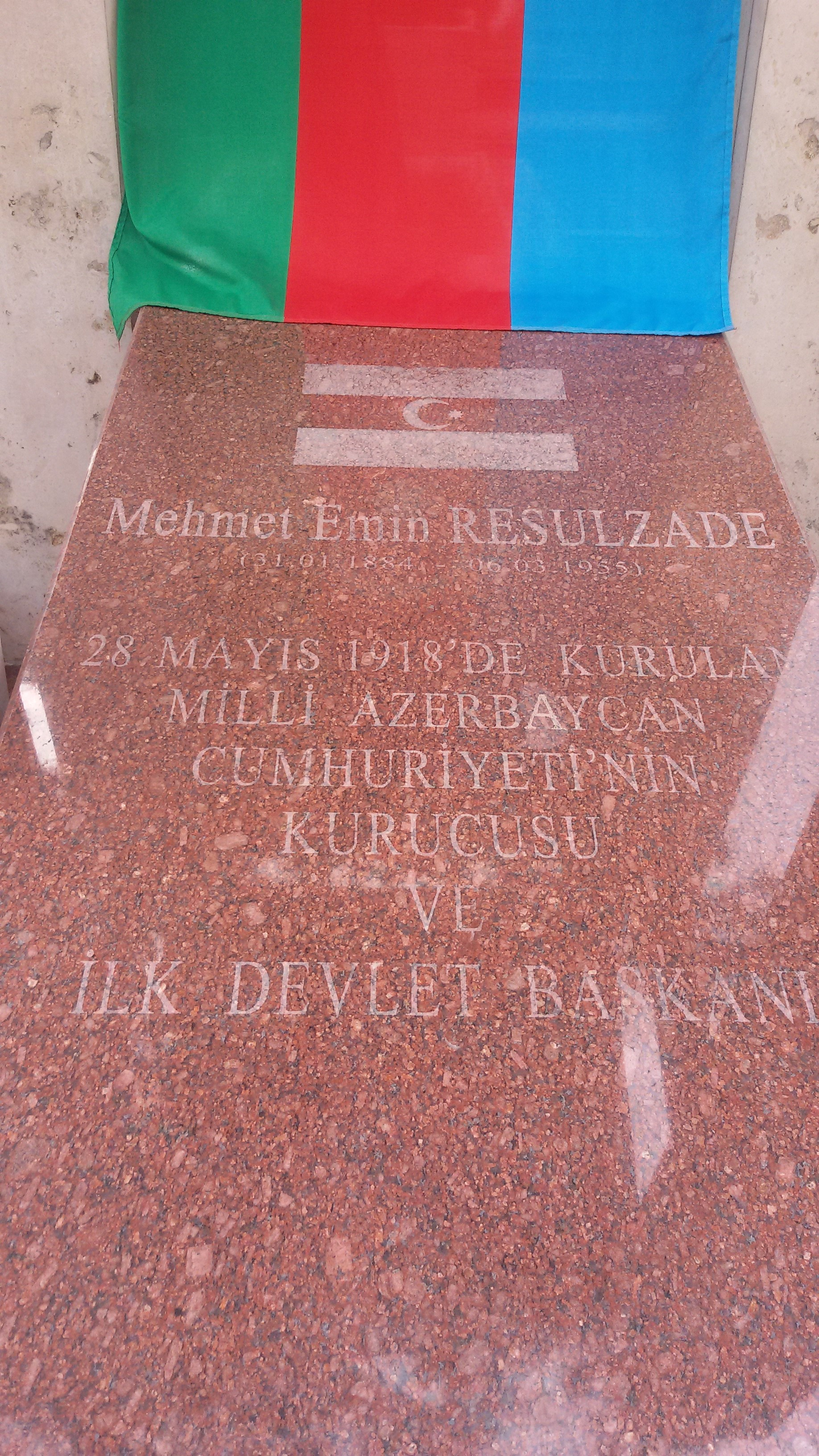 Məhəmməd Əmin Rasulzadənin Ankara şəhərində Cebeci Asri Mezarlığında məzarı (qəbirin üzərində olan yazılar)